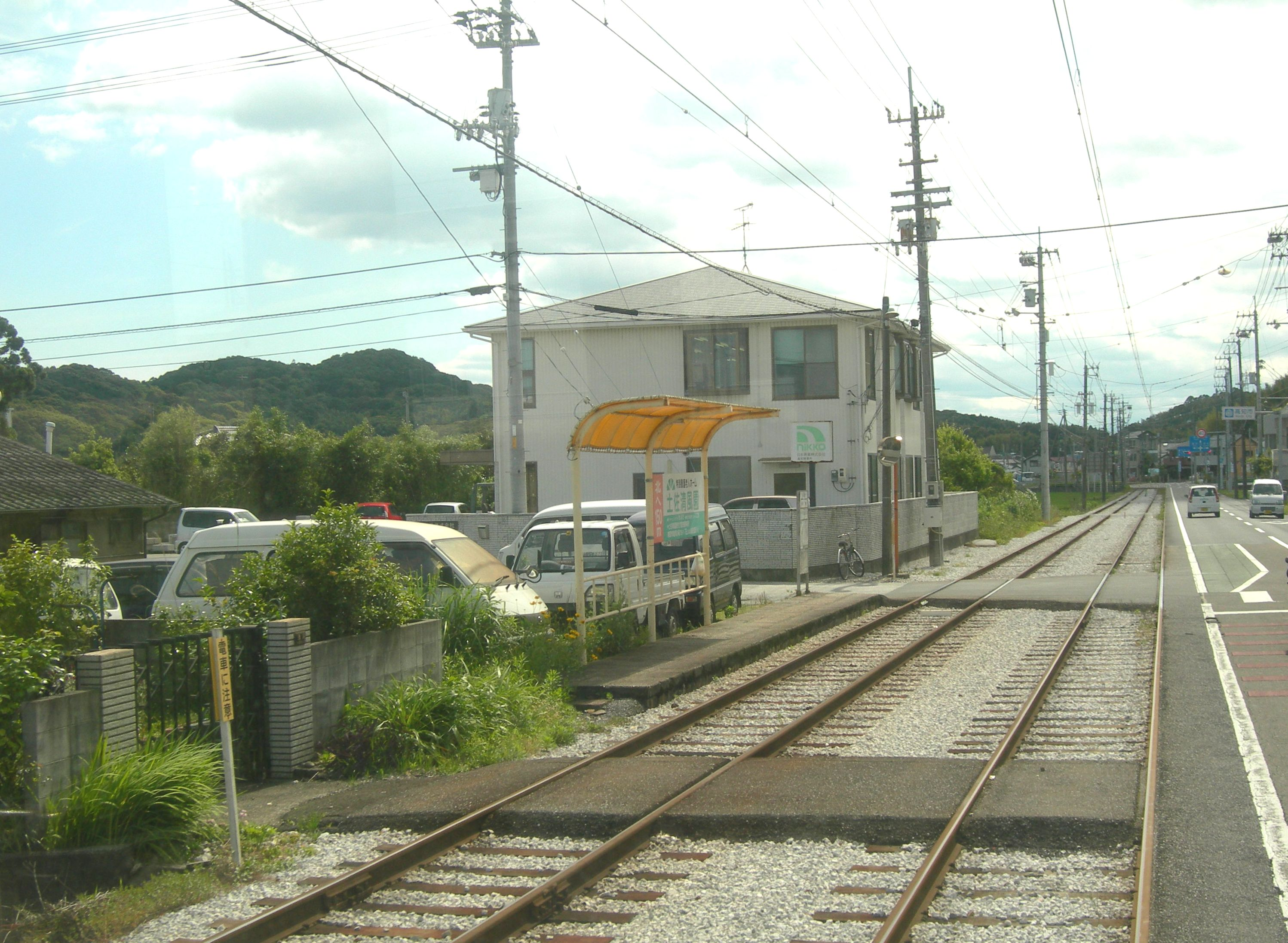 土佐電気鉄道小籠通電停。